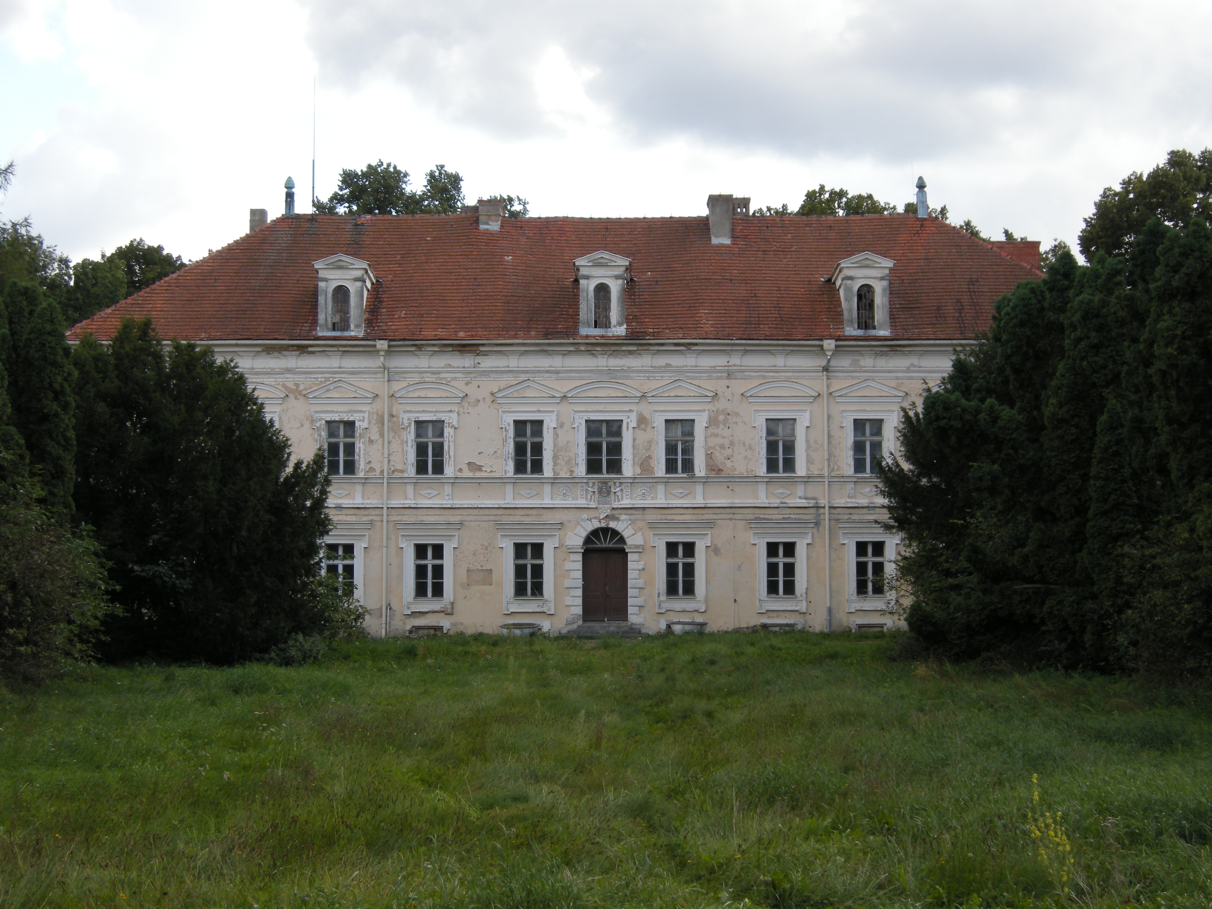 Pałac w Konarzewie w powiecie poznańskim